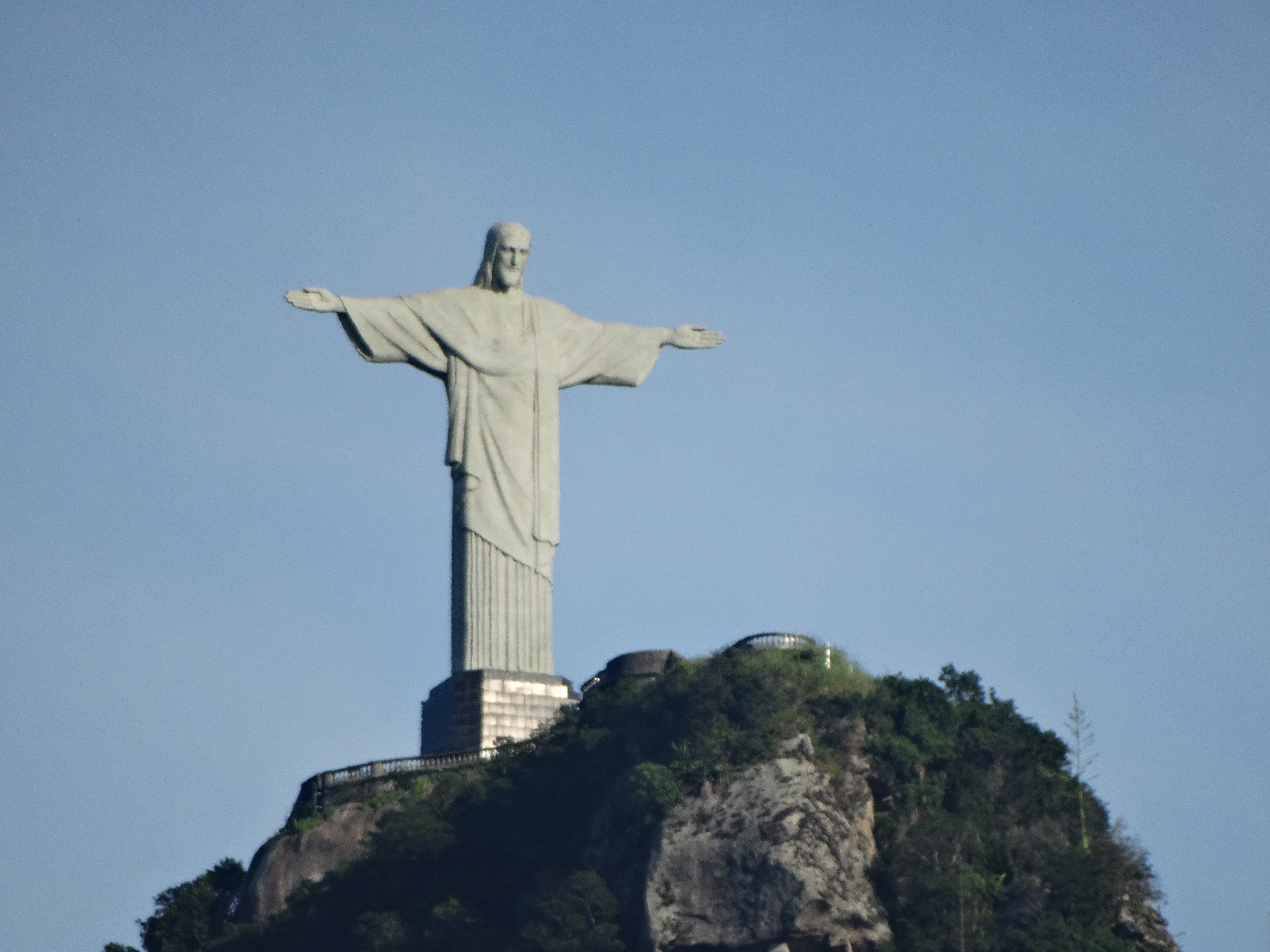 Vista da Minha Janela, no Bairro e Botafogo, que aponta para o Cristo Redentor